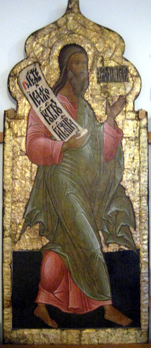 Исаак. Праотеческий ряд. 1630 год. Ждан Дементьев, Вологда. Собор Успения Богородицы, Кирилло-Белозерский монастырь. Музей Кирилло-Белозерского монастыря